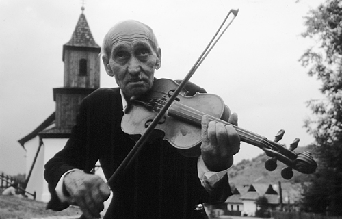 Fiddler from Hungary